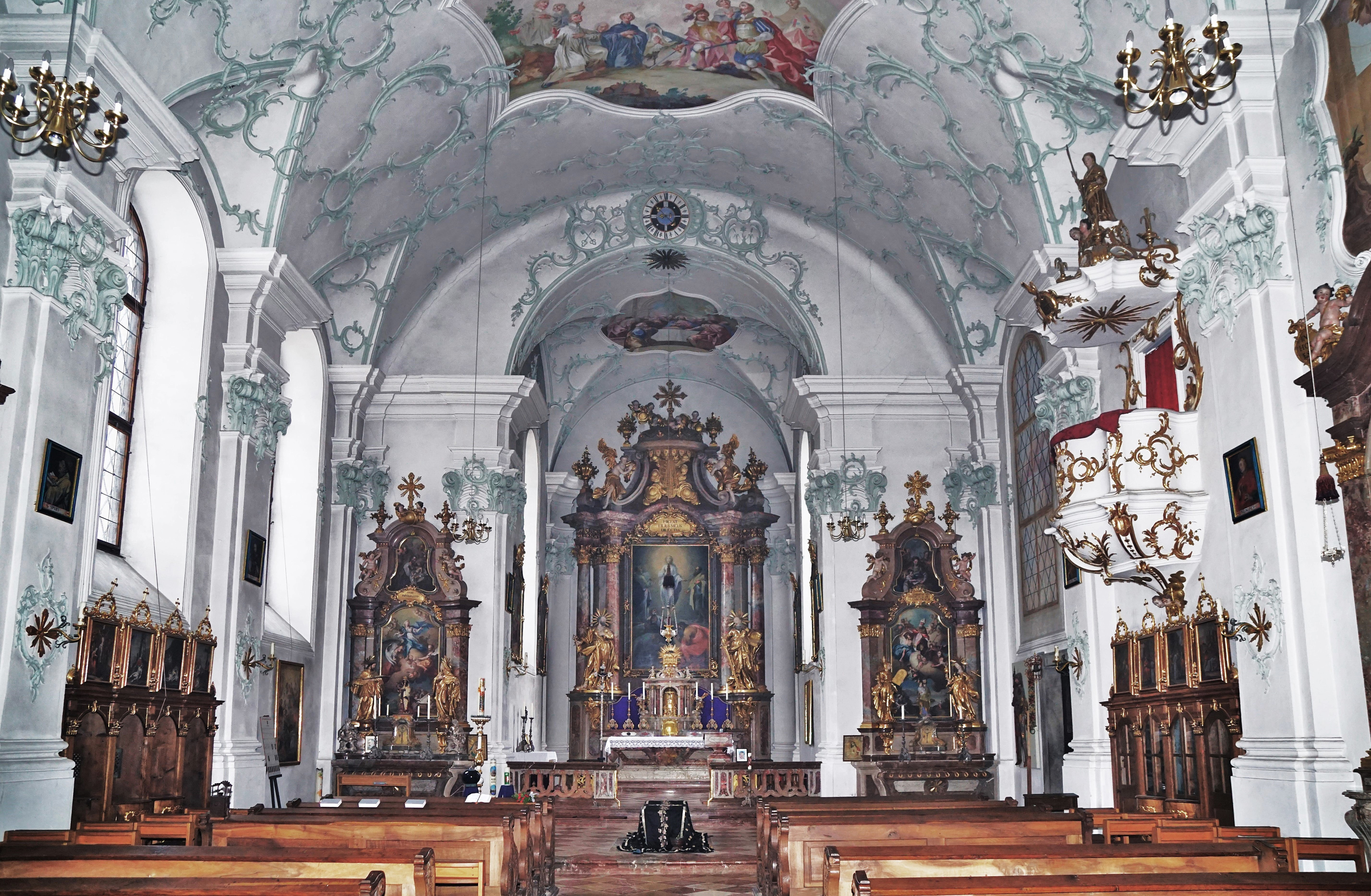 Innenansicht der ehemaligen Stiftskirche Höglwörth